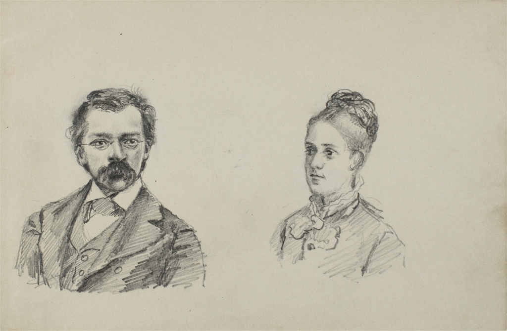 Woldemar Bargiel and his wife Hermine in 1881